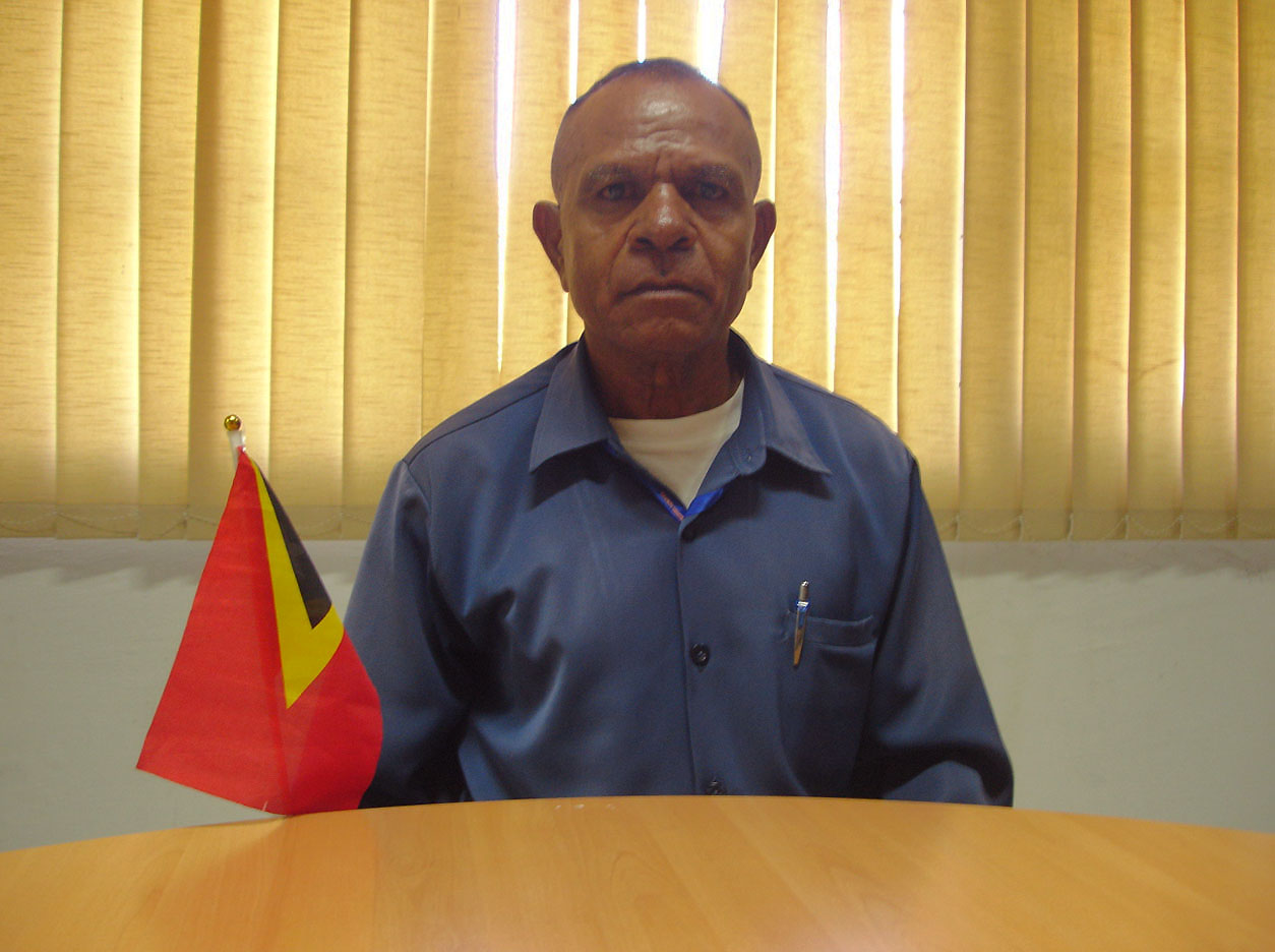 Luis Maria da Silva Mota, Administrator des Subdistrikts Dom Aleixo